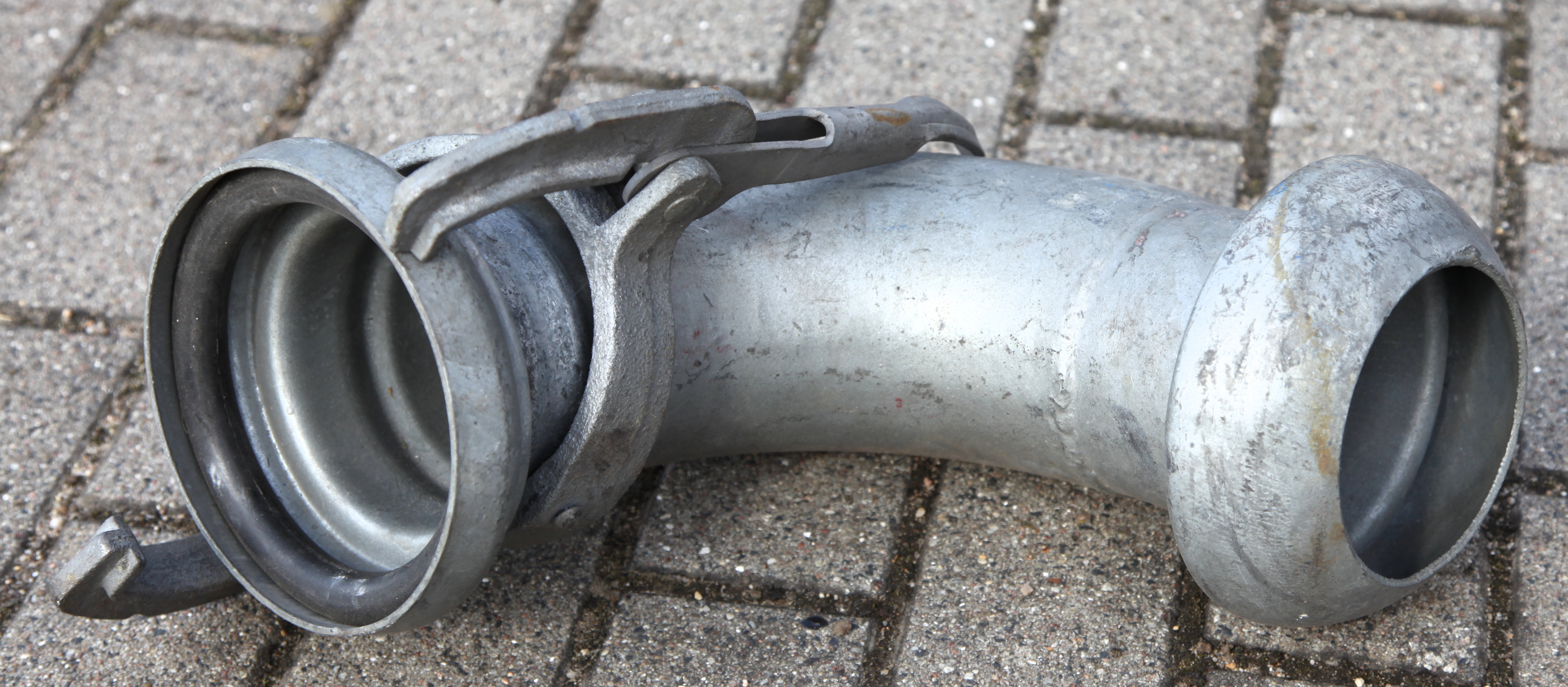 SK-Kupplung/Perrot-Kupplung